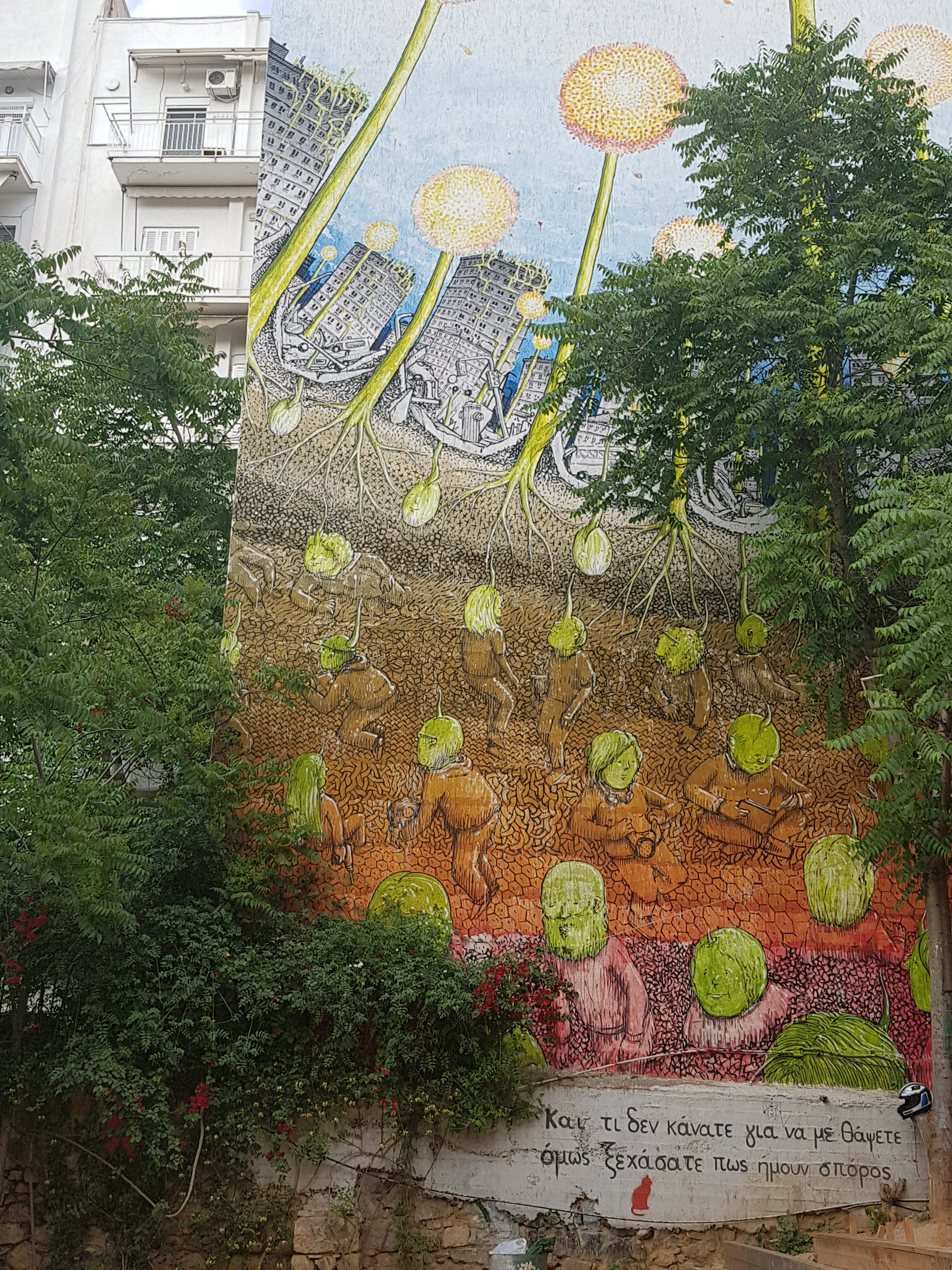 Γκράφιτι στο πάρκο Ναυαρίνου.